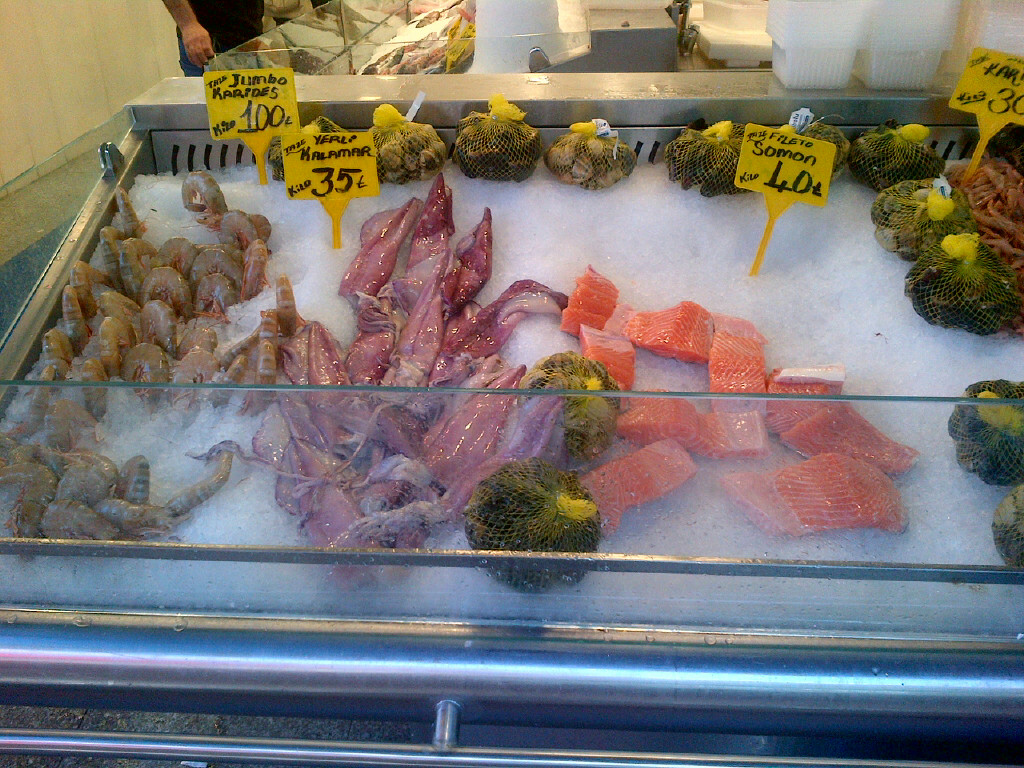 Salmon, volador (calamar grande), langostinos "jumbo" y mariscos en una pescaderia en el Mercado Historico de Kadıköy, Istanbul.